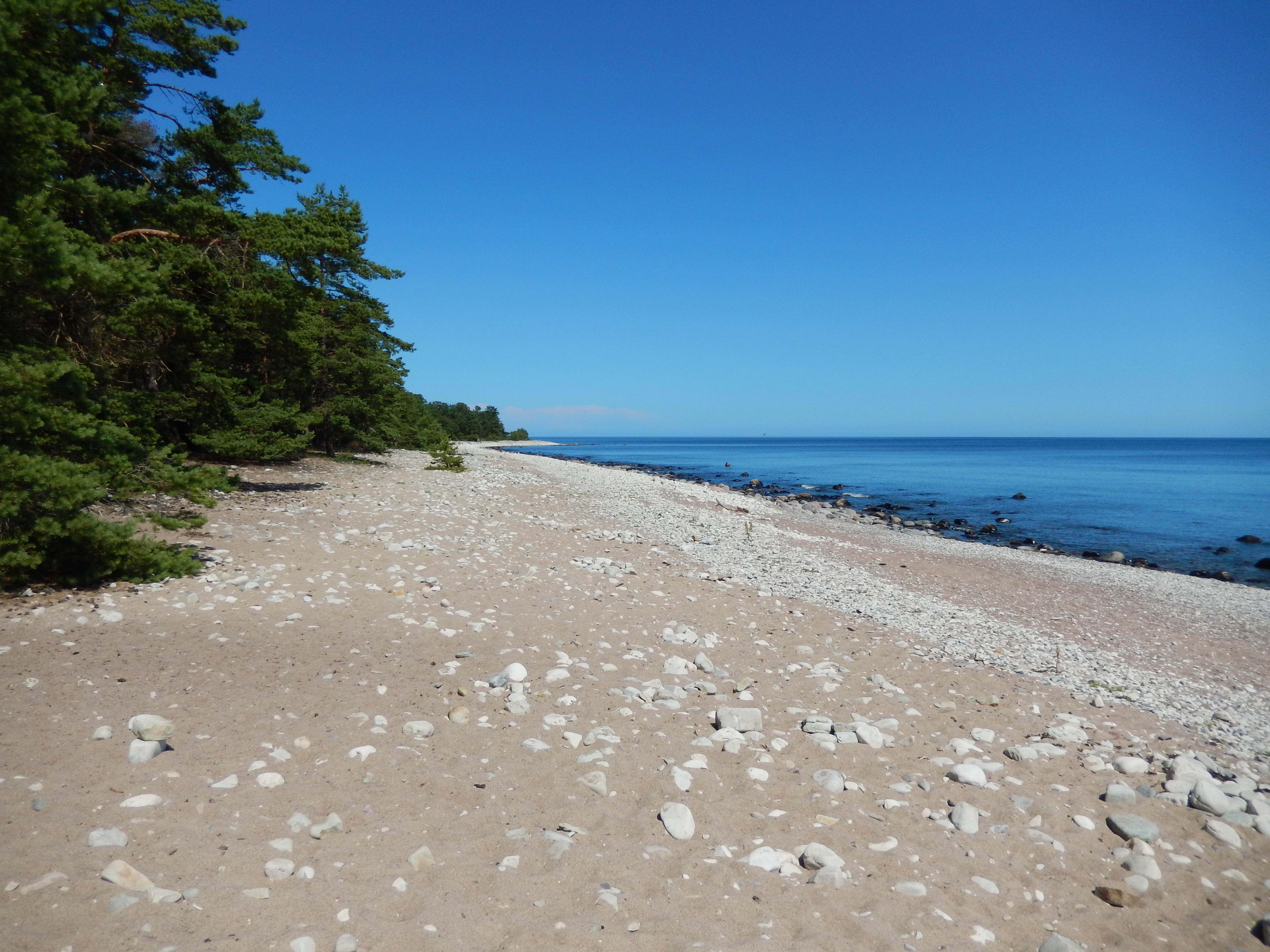 Strand i Trollskogen på Öland.